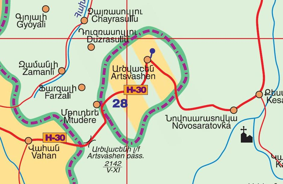 Анклав Арцвашен, окупированный Азербайджаном.